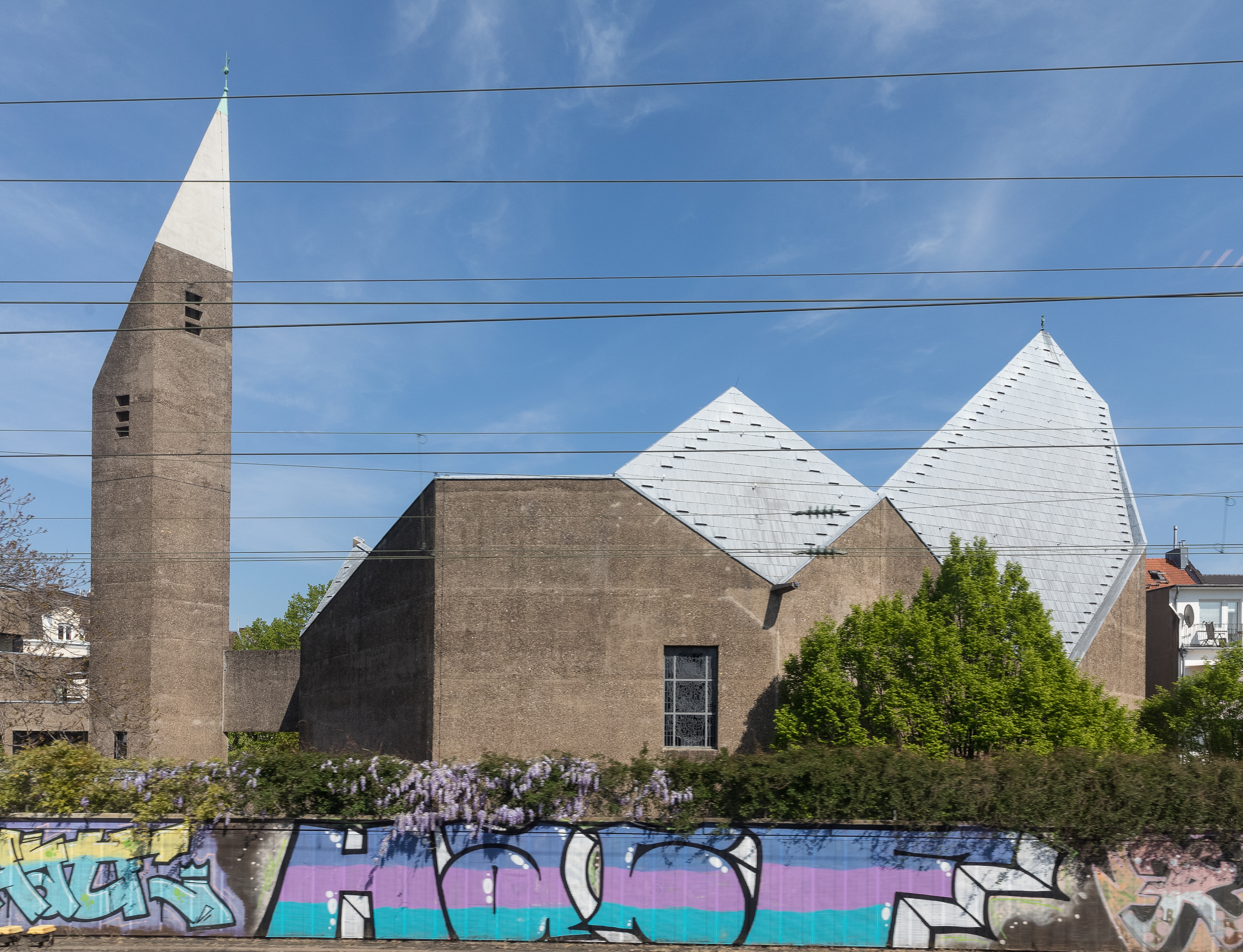 St. Gertrud, Köln - Ansicht von der Bahn